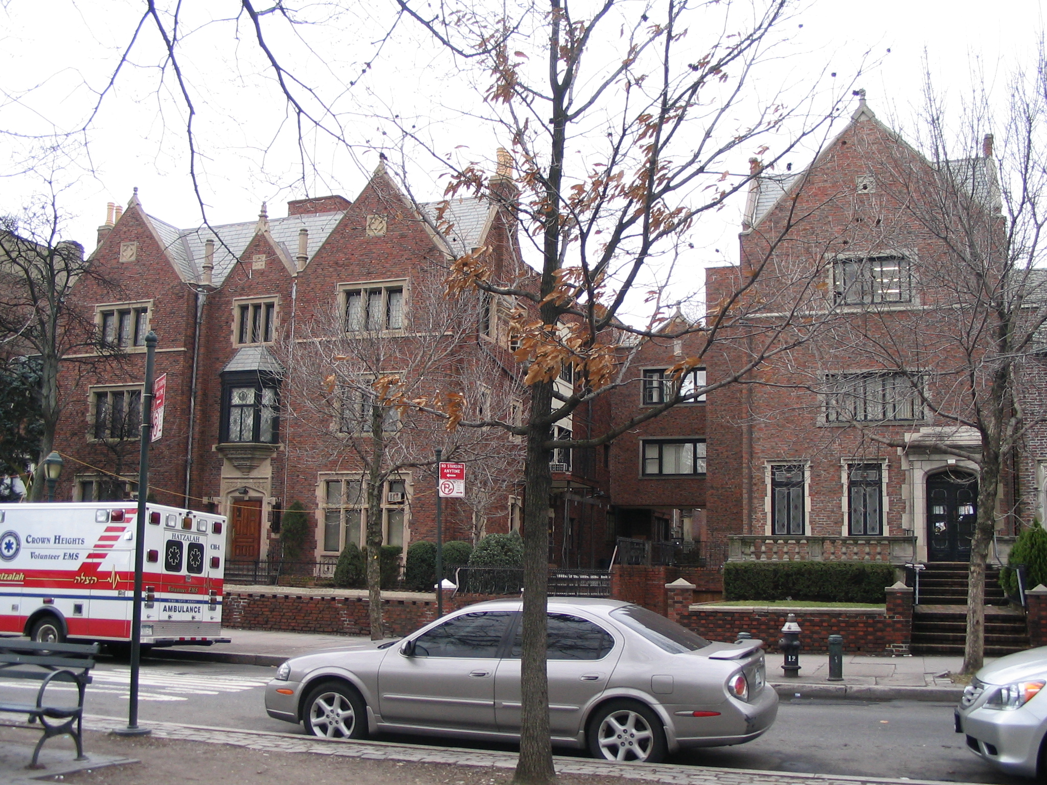 770 וספריית חב"ד